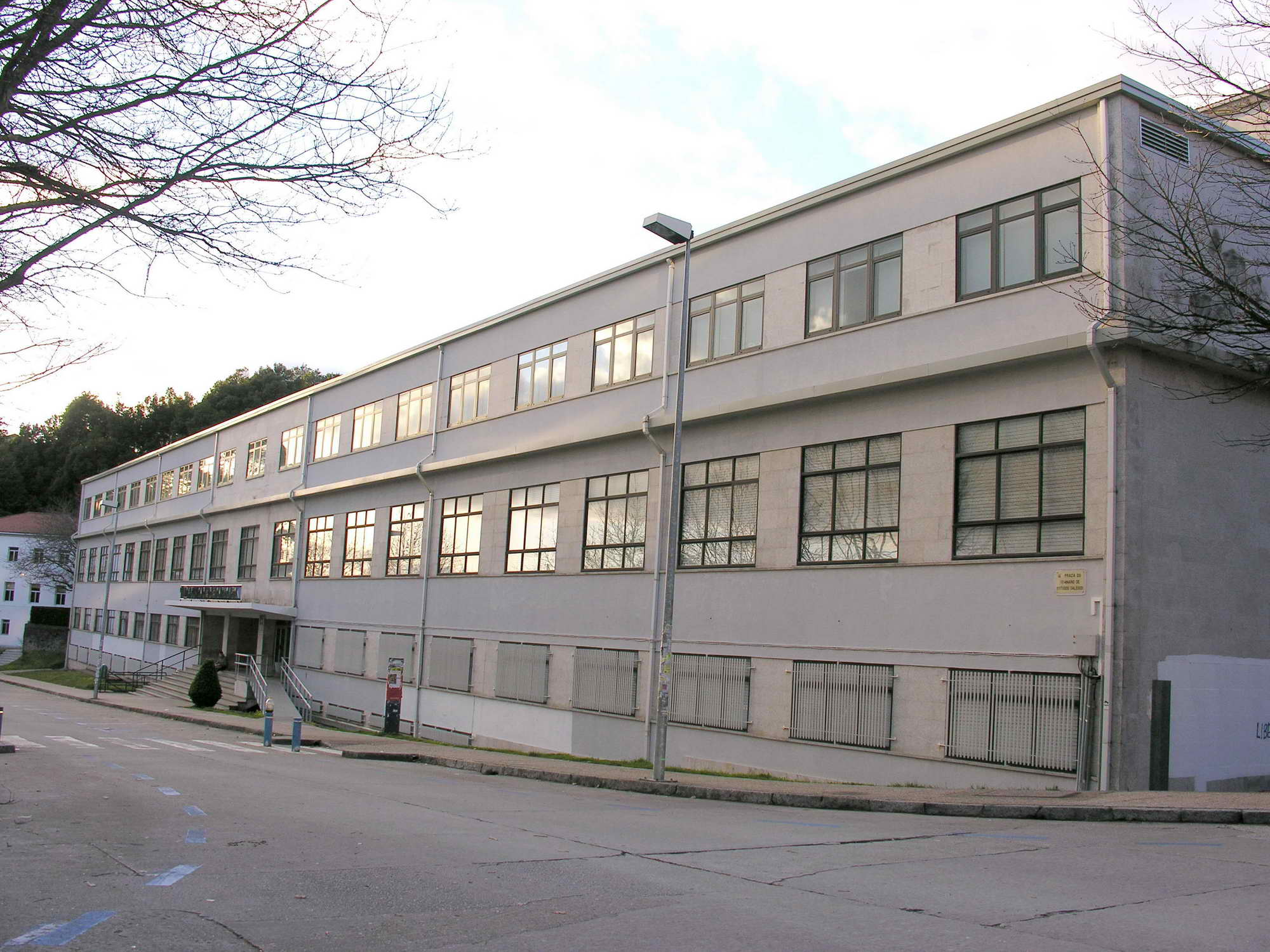 self made Santiago de Compostela Galicia, Spain